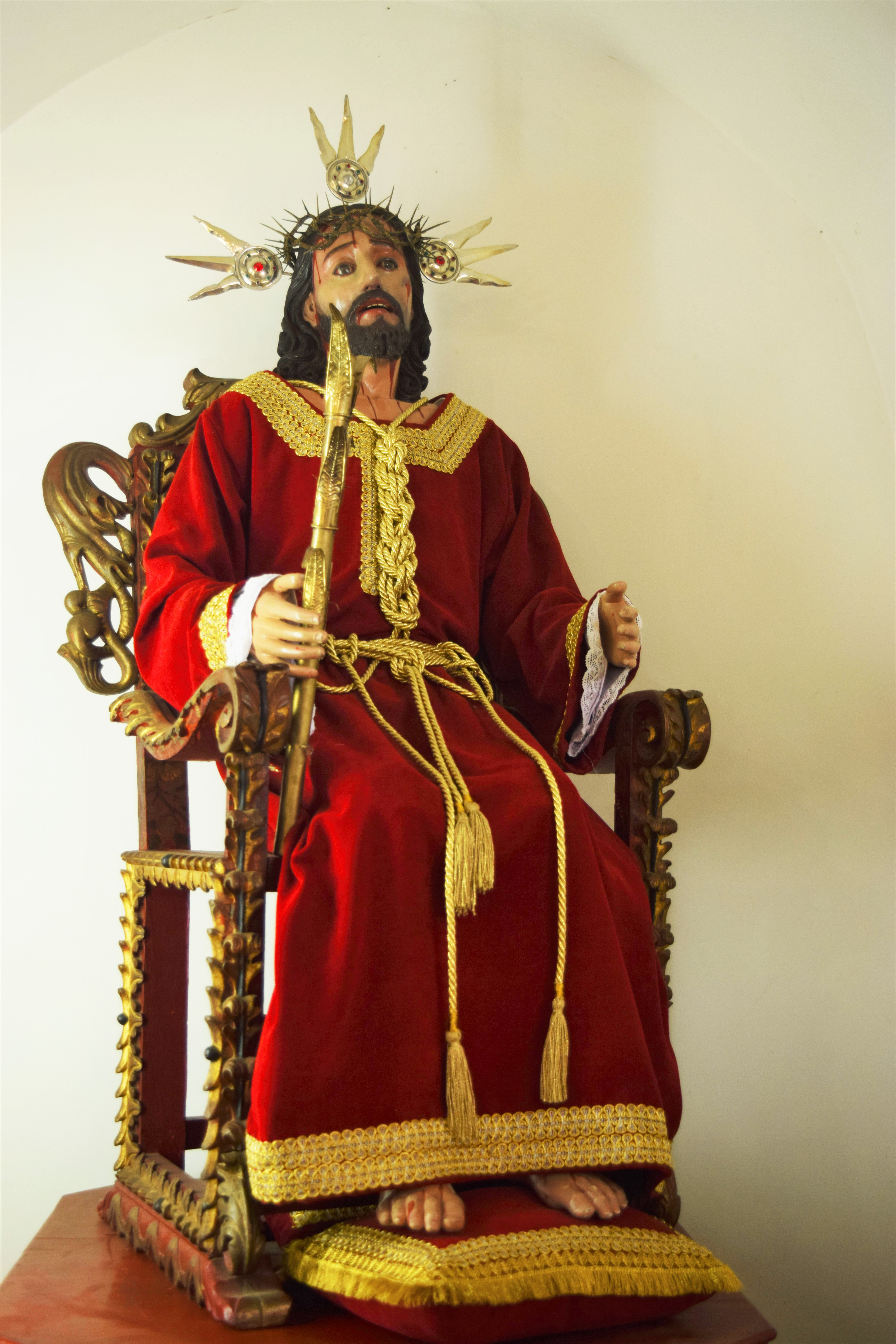 El Amo Jesús de Puelenje es una escultura de Jesucristo de talla completa y de vestir de estilo barroco, encarnada, hecha en madera policromada del siglo XVII de la escuela quiteña ubicada en el templo de Puelenje, corregimiento de la ciudad de Popayán, Colombia.